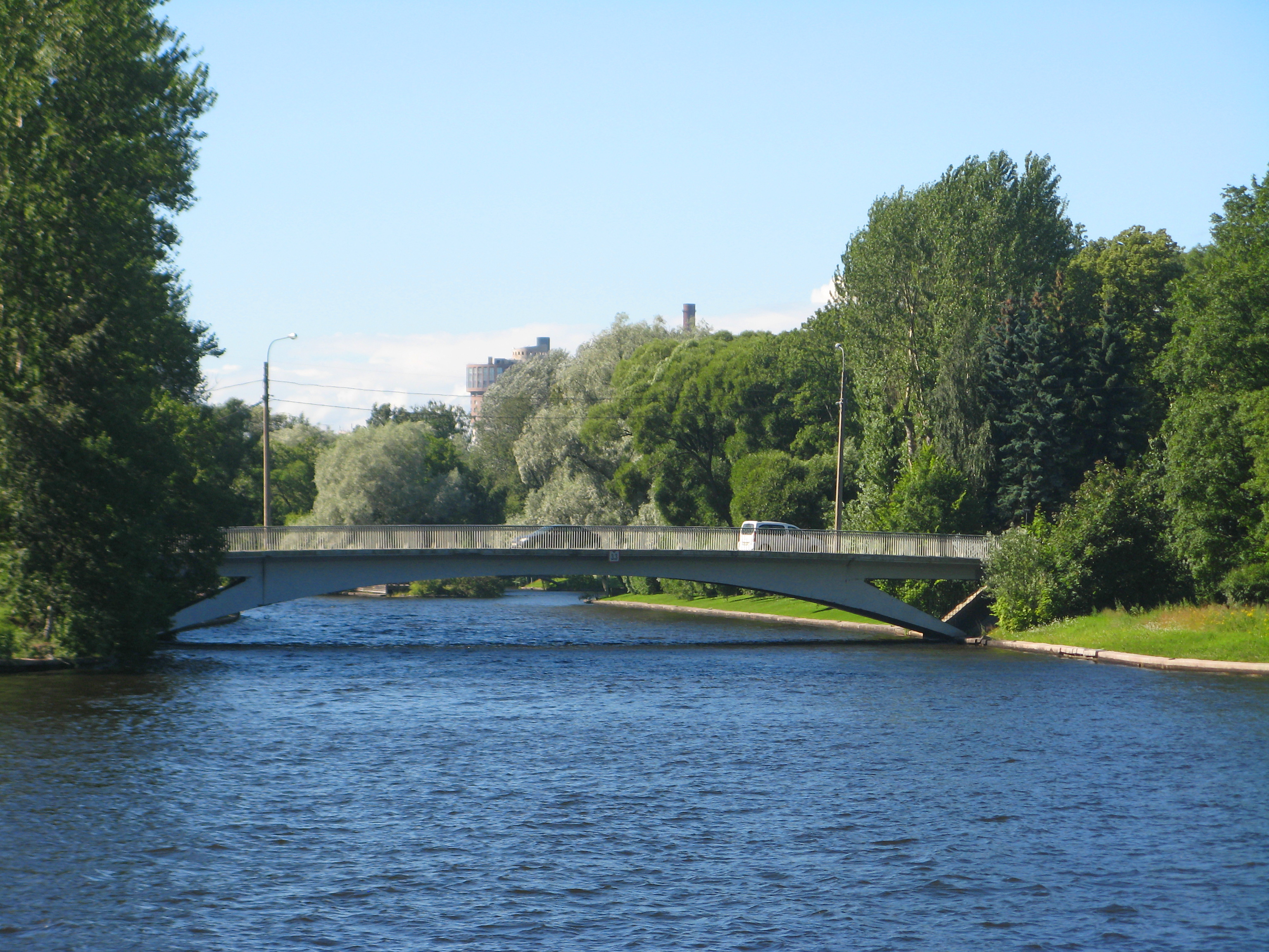 Мало-Крестовский мост: через р. Крестовку, по проспекту Динамо, Петроградский район, Санкт-Петербург